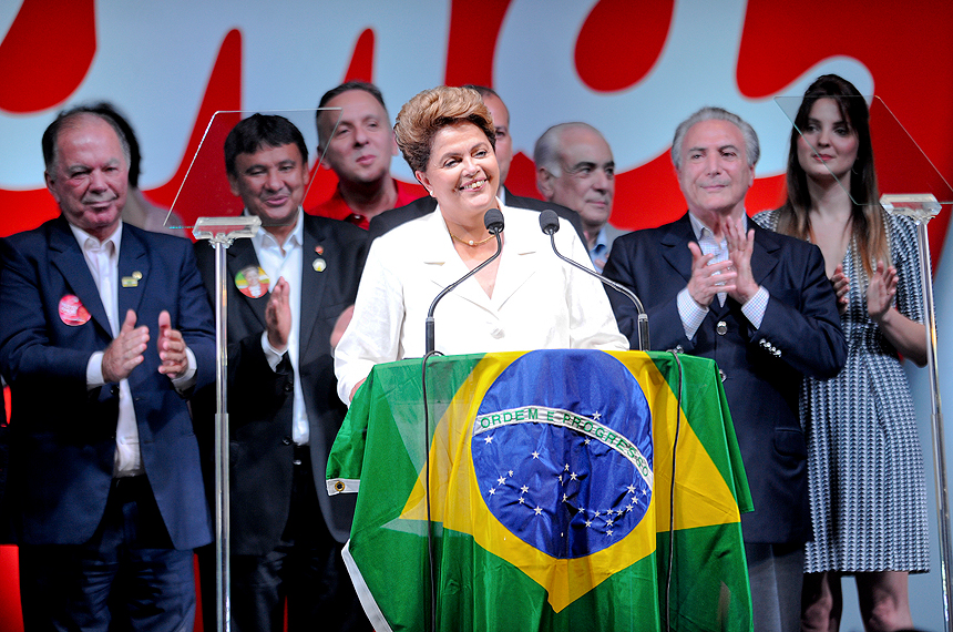 Eleições 2014 - BIE - Brasília Primeiro pronunciamento após ser confirmada como presidente reeleita do Brasil, Dilma Rousseff (PT) afirmou neste domingo (26) não acreditar que a acirrada disputa eleitoral tenha “dividido” o país.